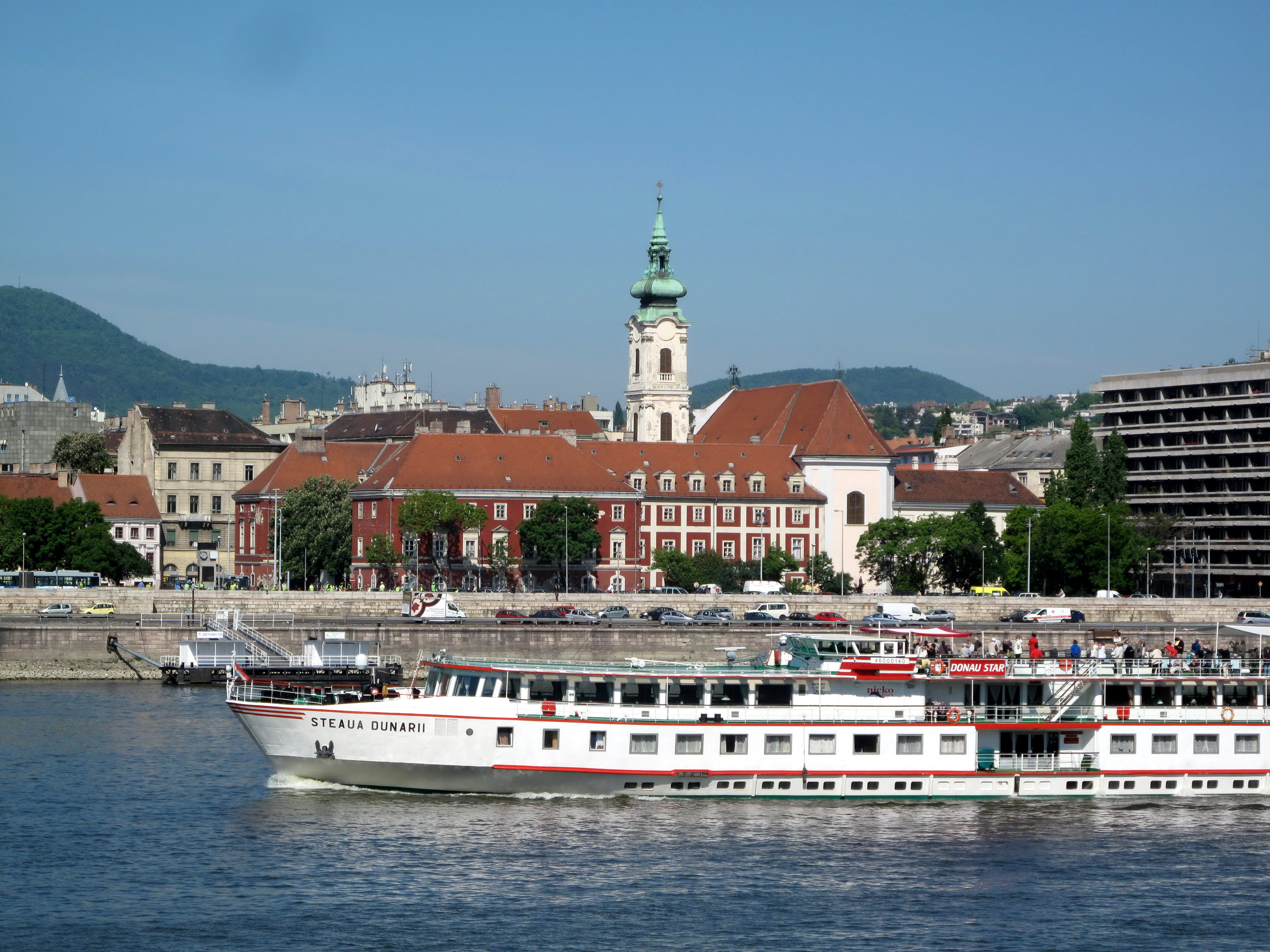 BudapešťRómai katolikus templom; Erzsébetiek temploma, Fő utca 41., Bem József rakpart 29.barokk, Hans Jakab, 1731-1741. műemlék ID 41